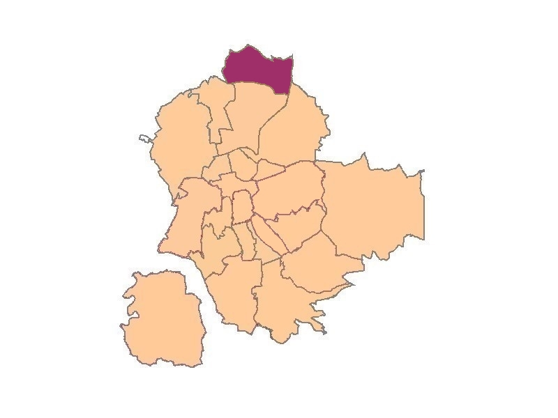 plan de saint-etienne quartier du Montreynaud.